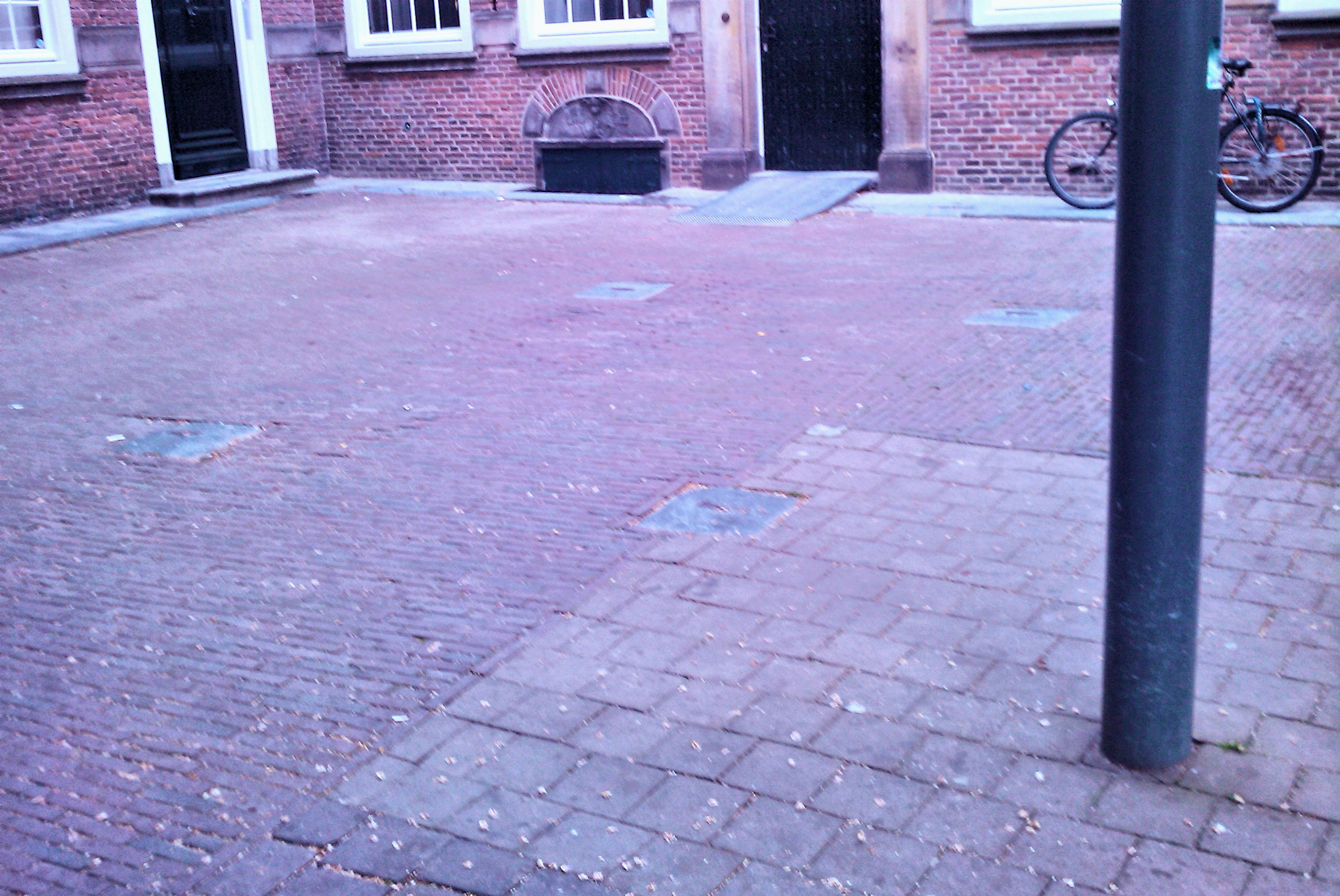 Rijksmonument, Deventer, Nederland (The Netherlands)